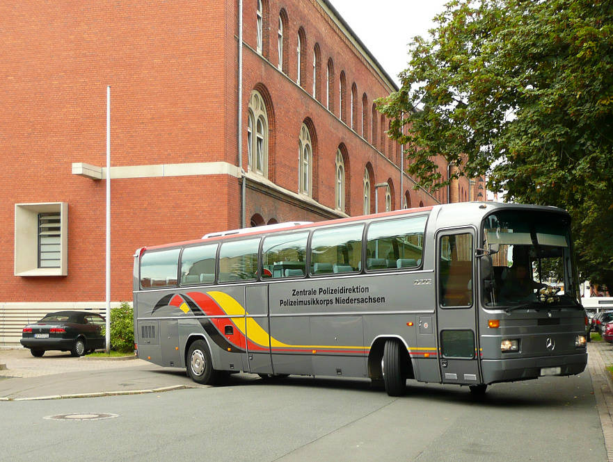 Bus des Polizeimusikkorps Niedersachsen